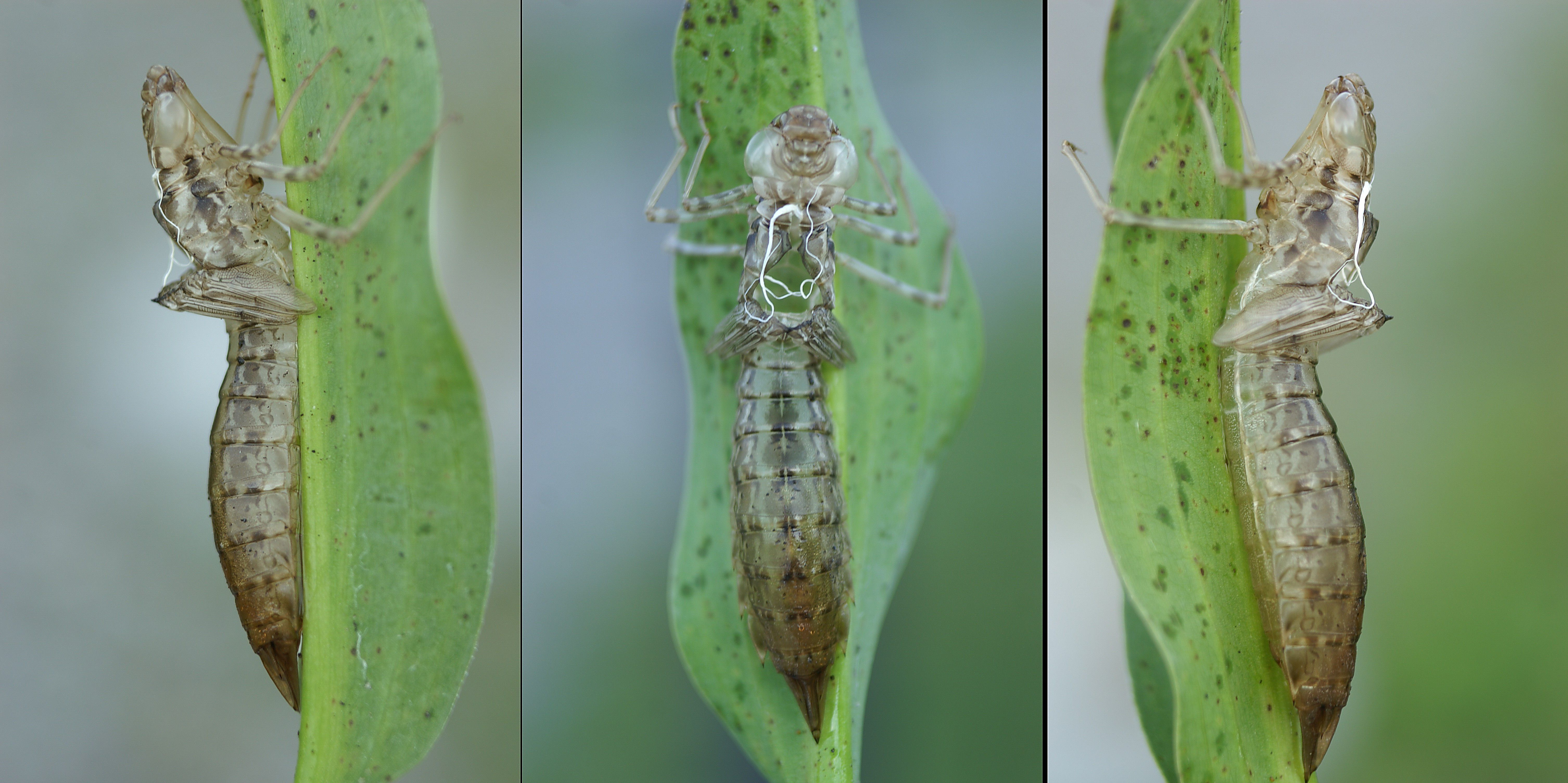 Exuvie der Grossen Königslibelle